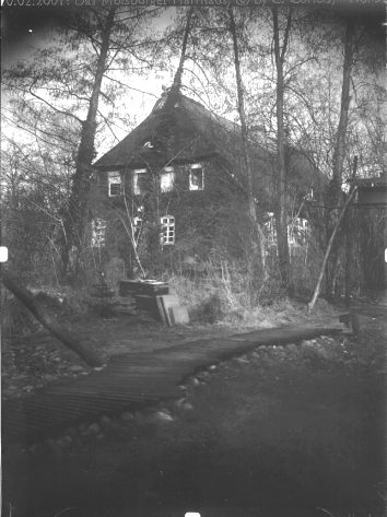 Moisburger Amtshaus (Beispiel für mech. Vignettierung)